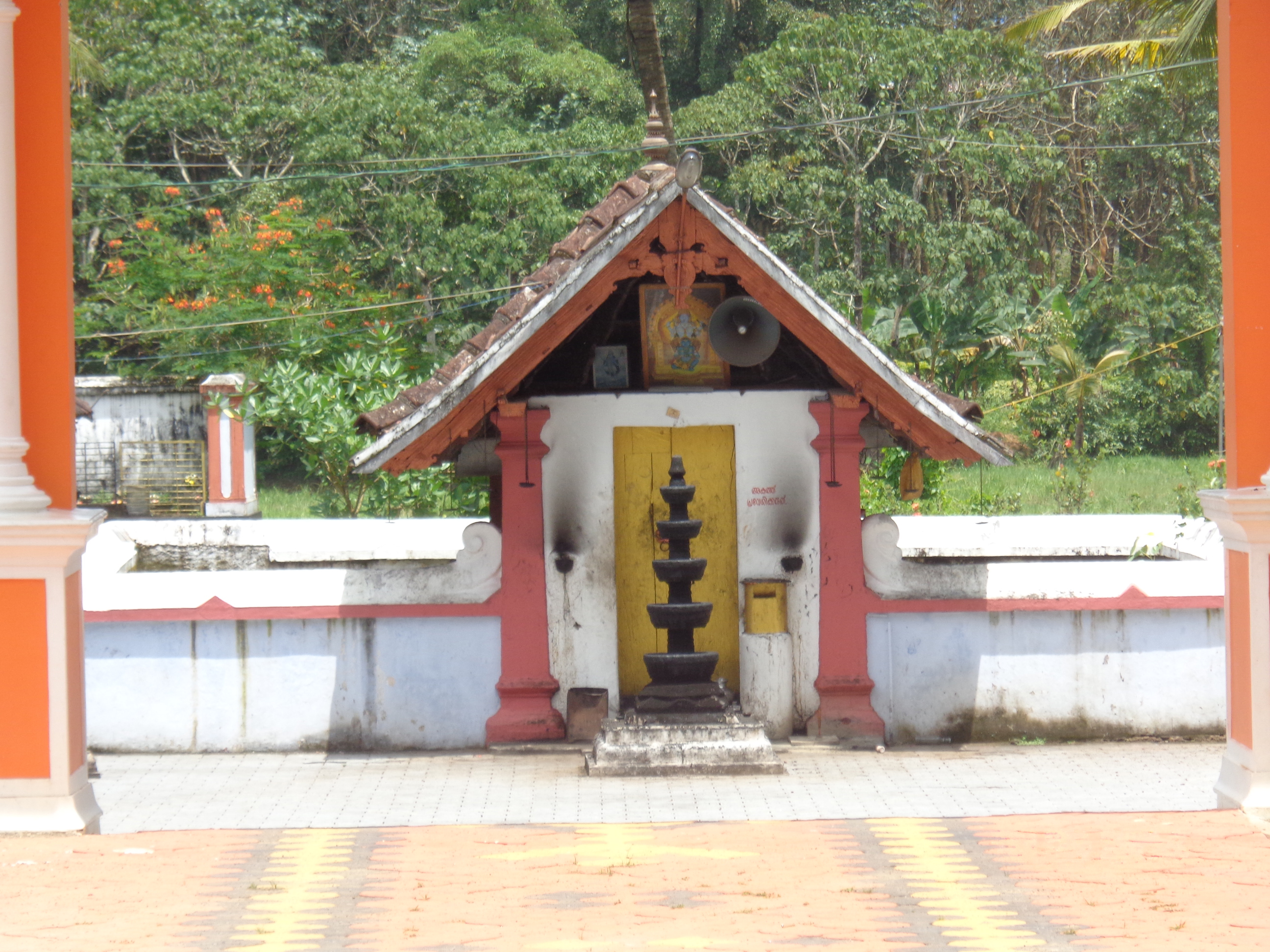 pattaramma nada moozhikulangara devi temple , neendoor, kottayam